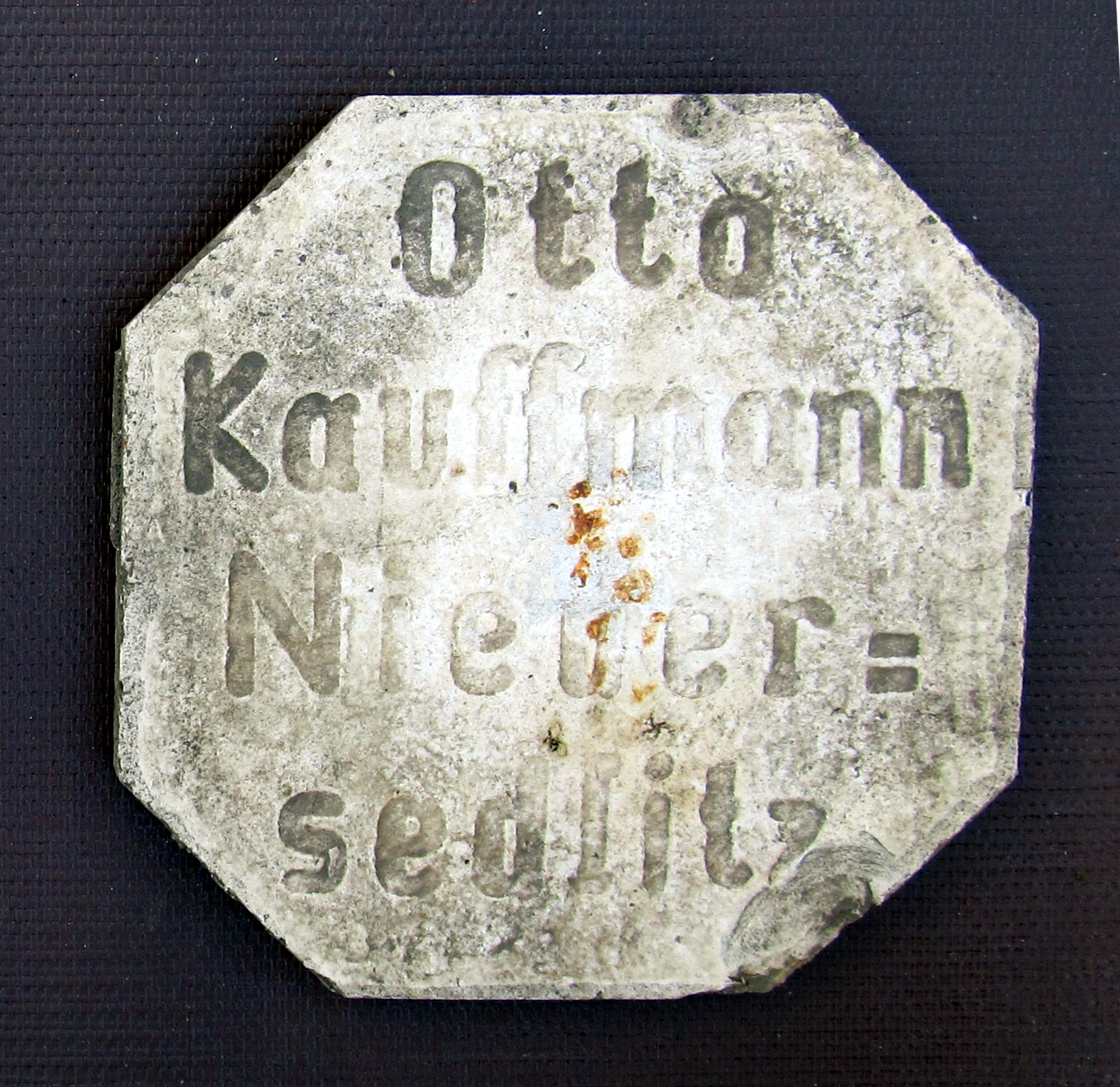 Fliese des Unternehmens Otto Kauffmann, Niedersedlitz, original aus dem früheren Fußbodenbelag im Treppenhaus eines 1905 fertiggestellten Wohnhauses in Kaditz, Dresden